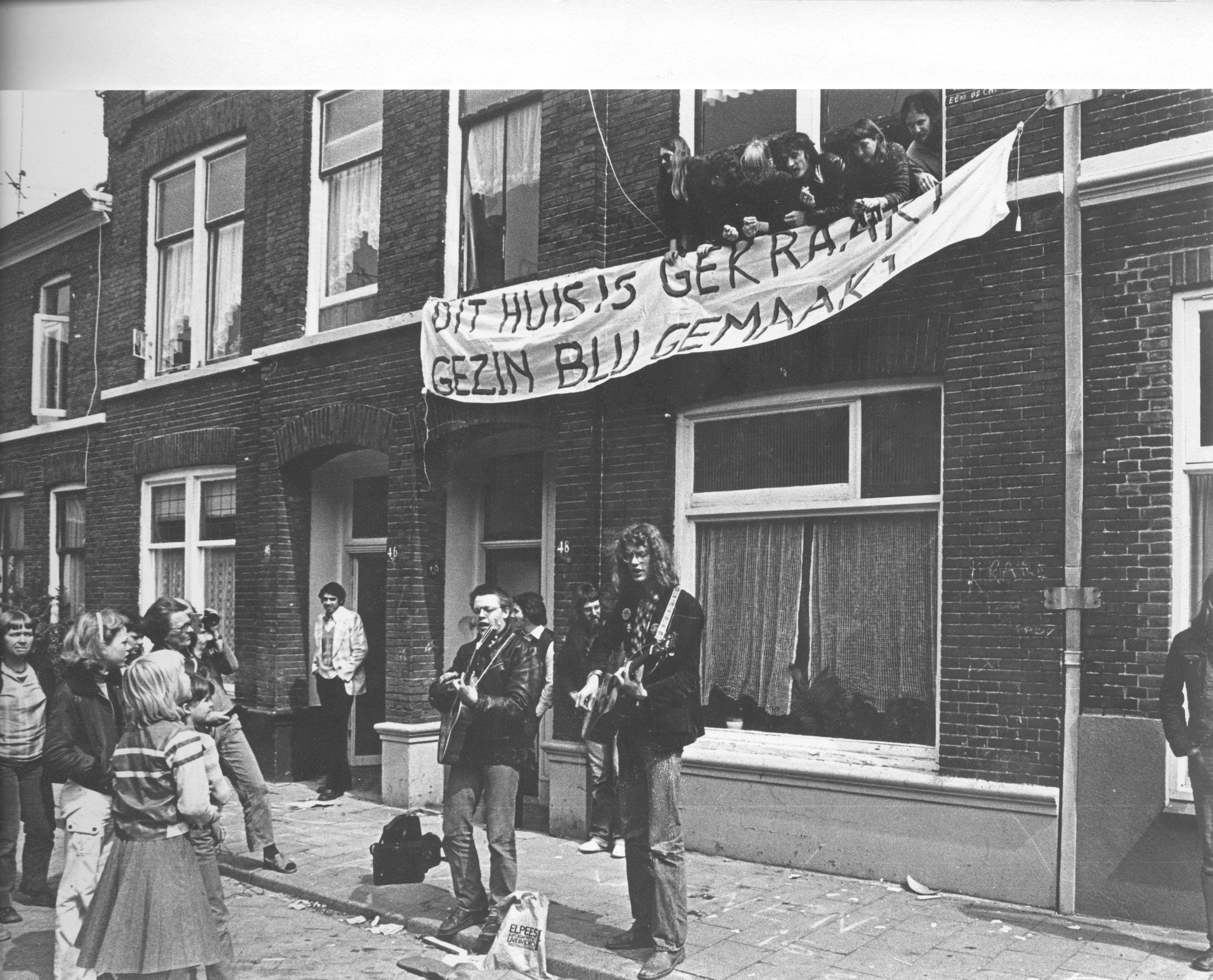 straat optreden van de Megafoons